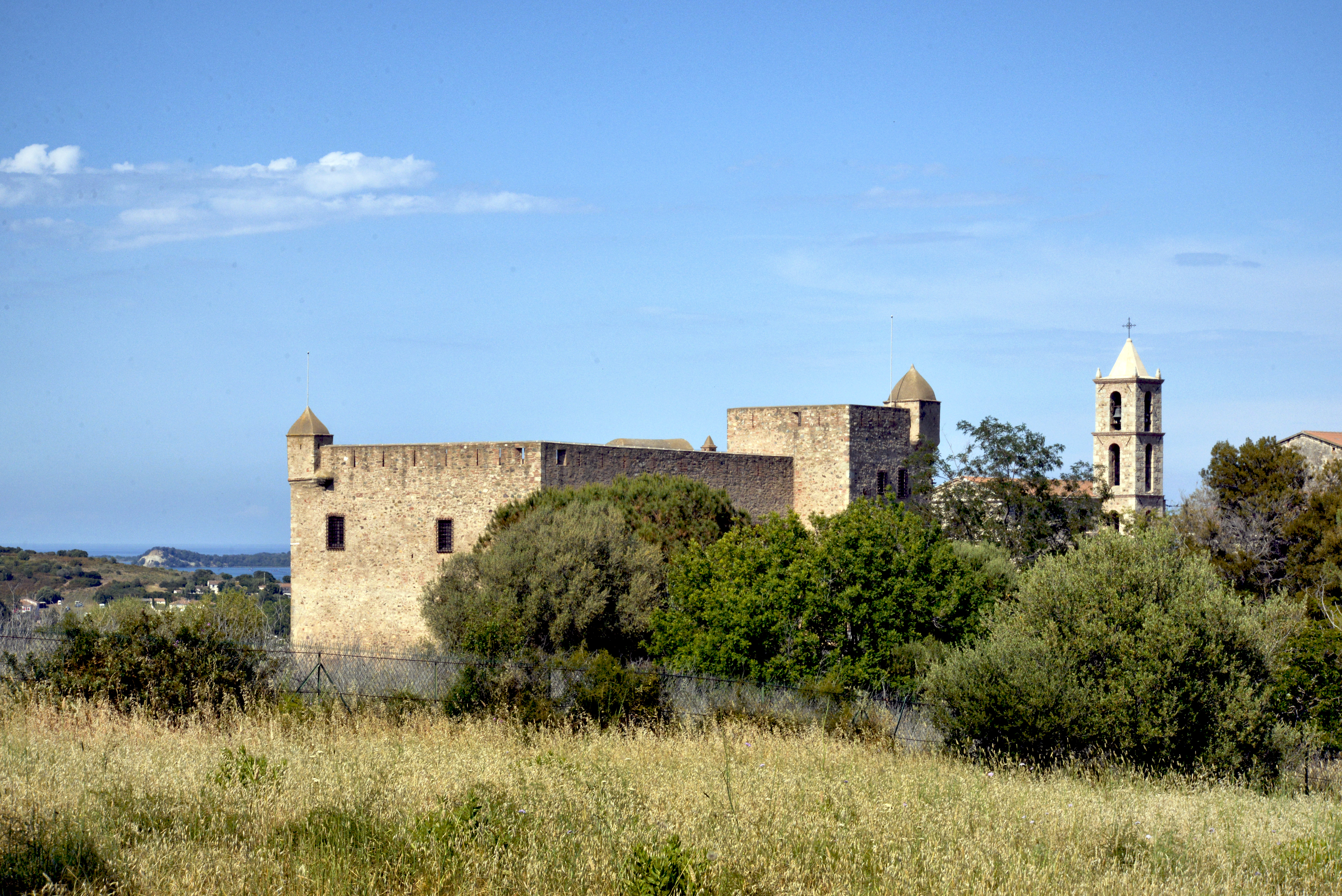 Aléria, Plaine orientale (Haute-Corse) - Le fort de Matra et le clocher de l'église San Marcello, vus depuis le site antique. .